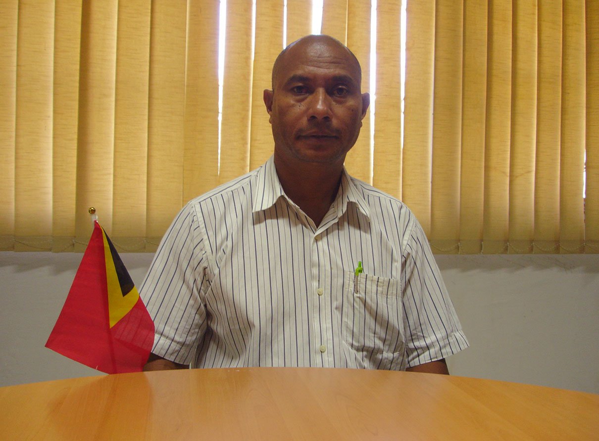 Carlito Pereira, Administrator des Subdistrikts Tutuala